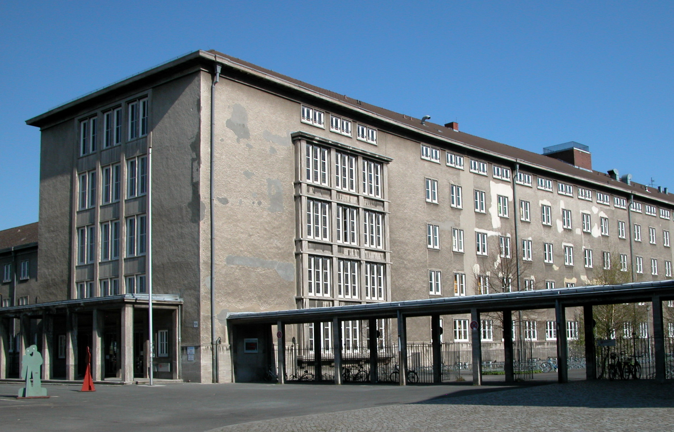 Braunschweig: Integrierte Gesamtschule Franzsches Feld, 1936–1938 ursprünglich erbaut als Luftflottenkommando 2.